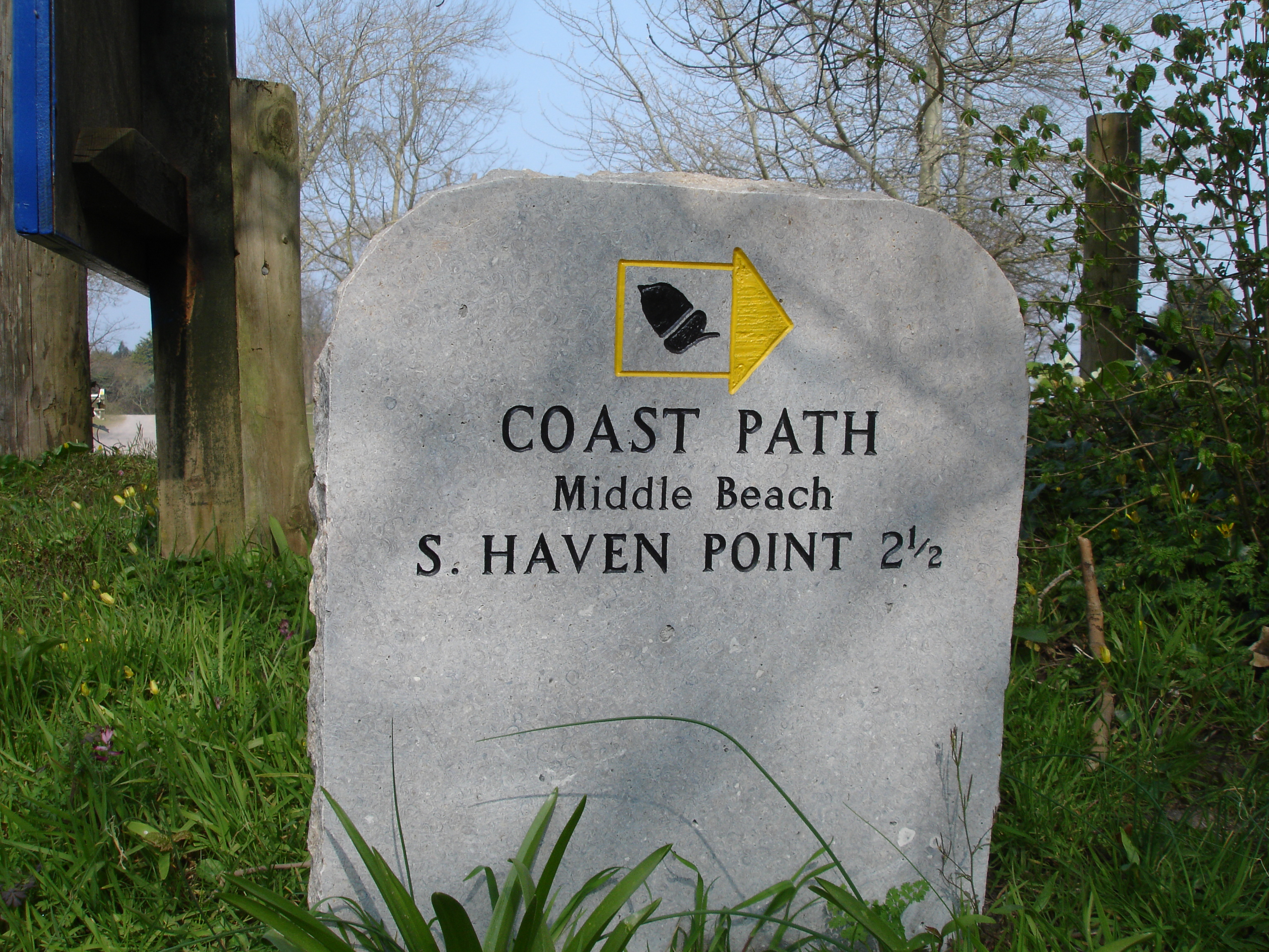 SWCP